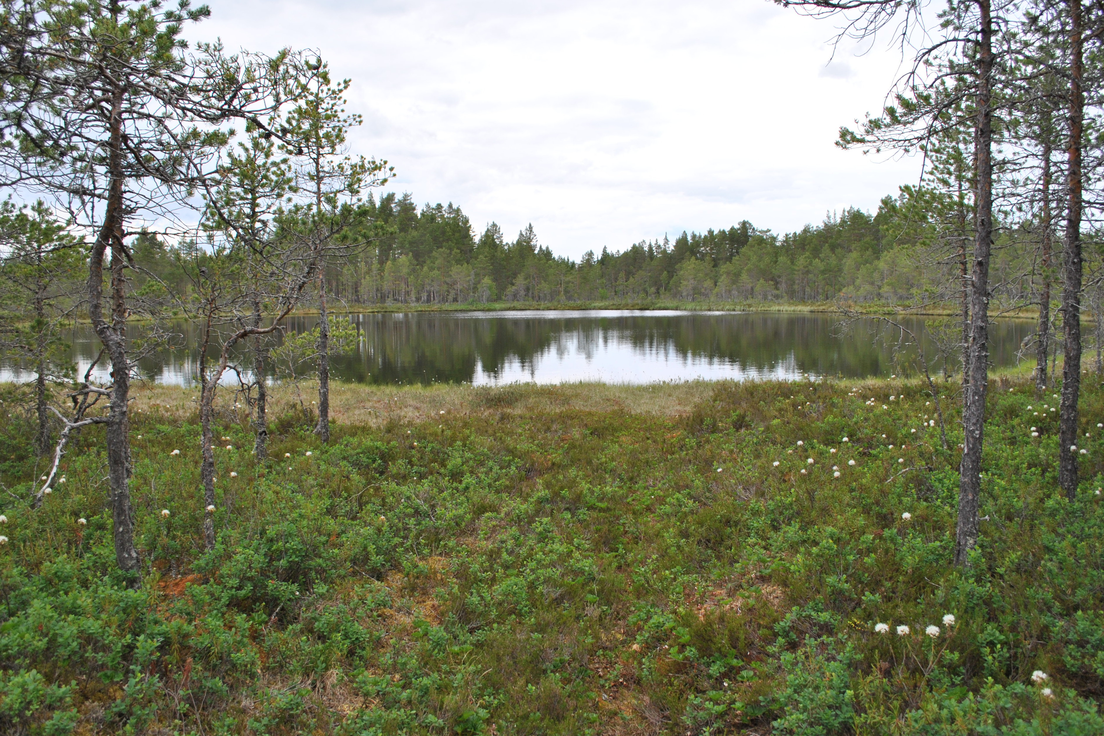 Östra Rossvikstjärnen, Floda socken, Dalarna vid midsommartid 2015